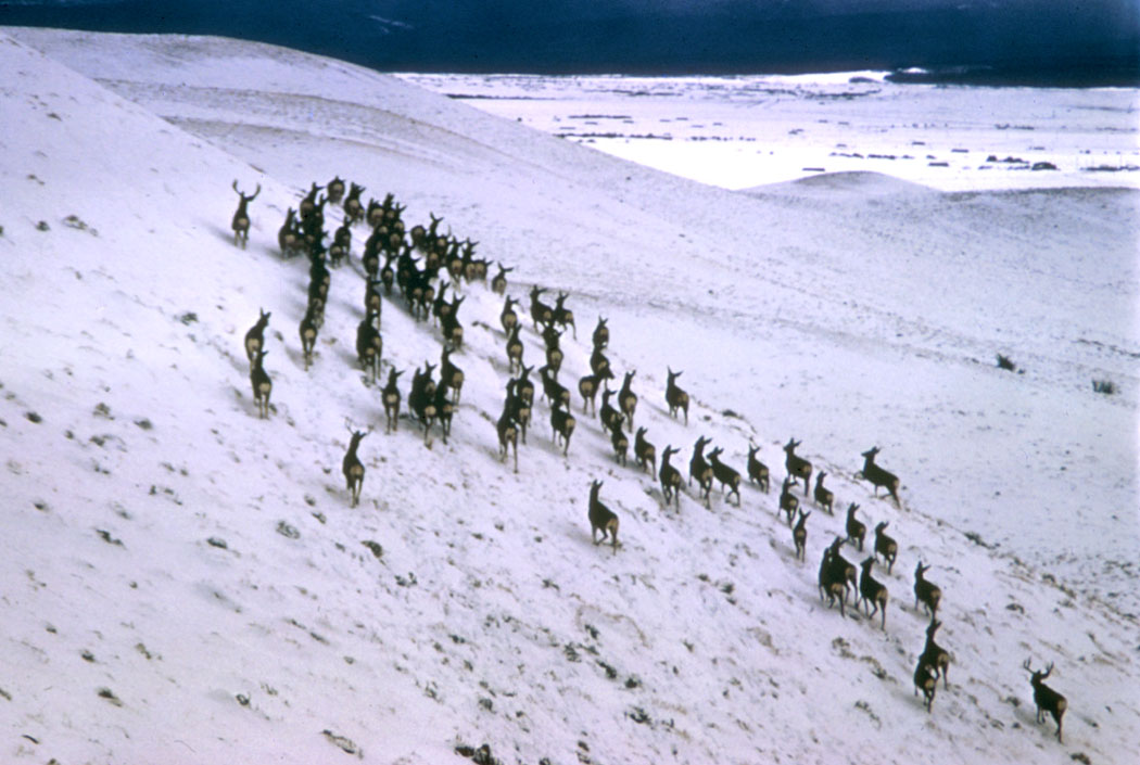 Maultierhirsch Herde von Maultierhirschen auf jahreszeitlicher Wanderung